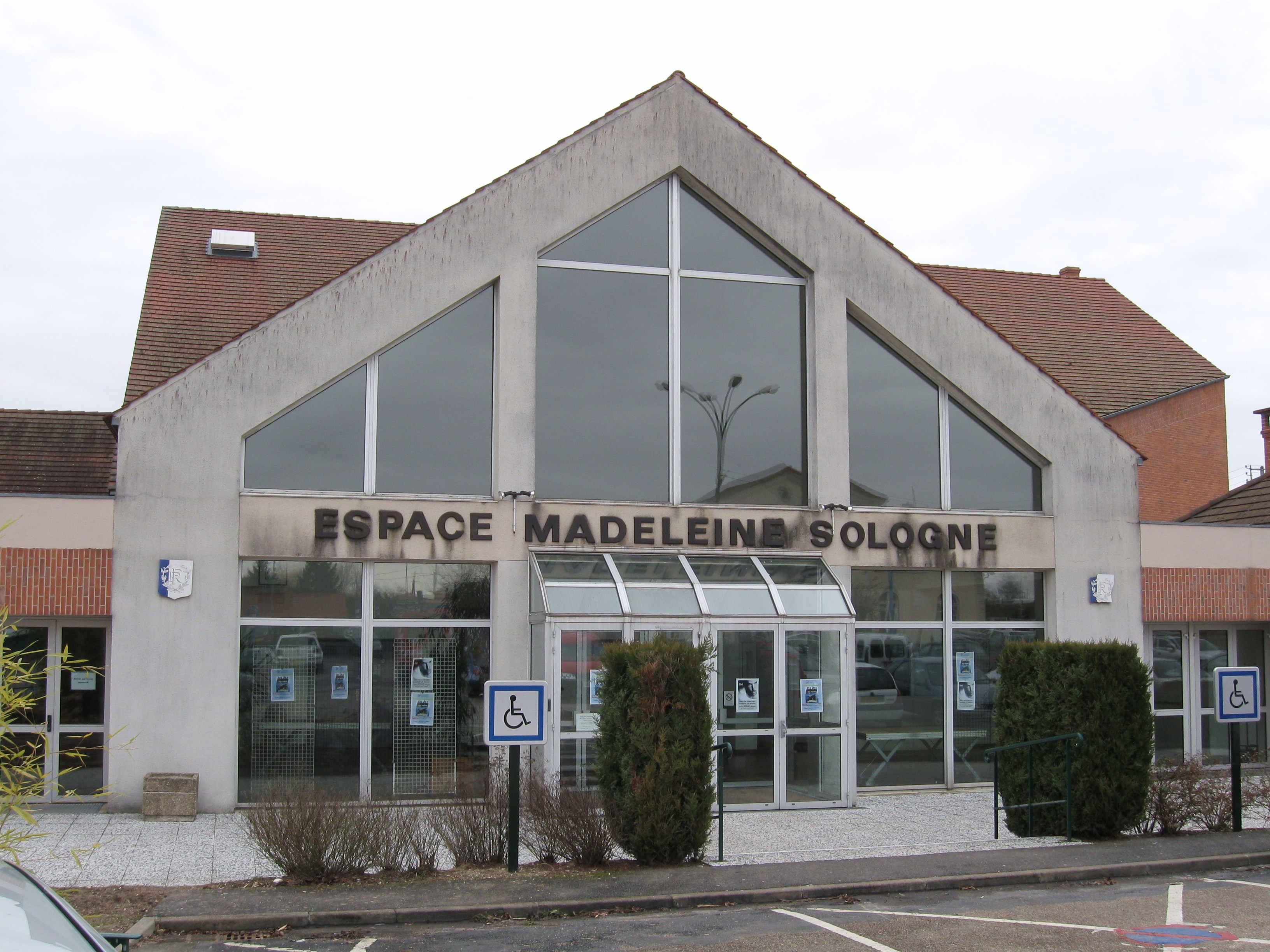 Espace Madeleine Sologne, La Ferté-Saint-Aubin, Loiret, France